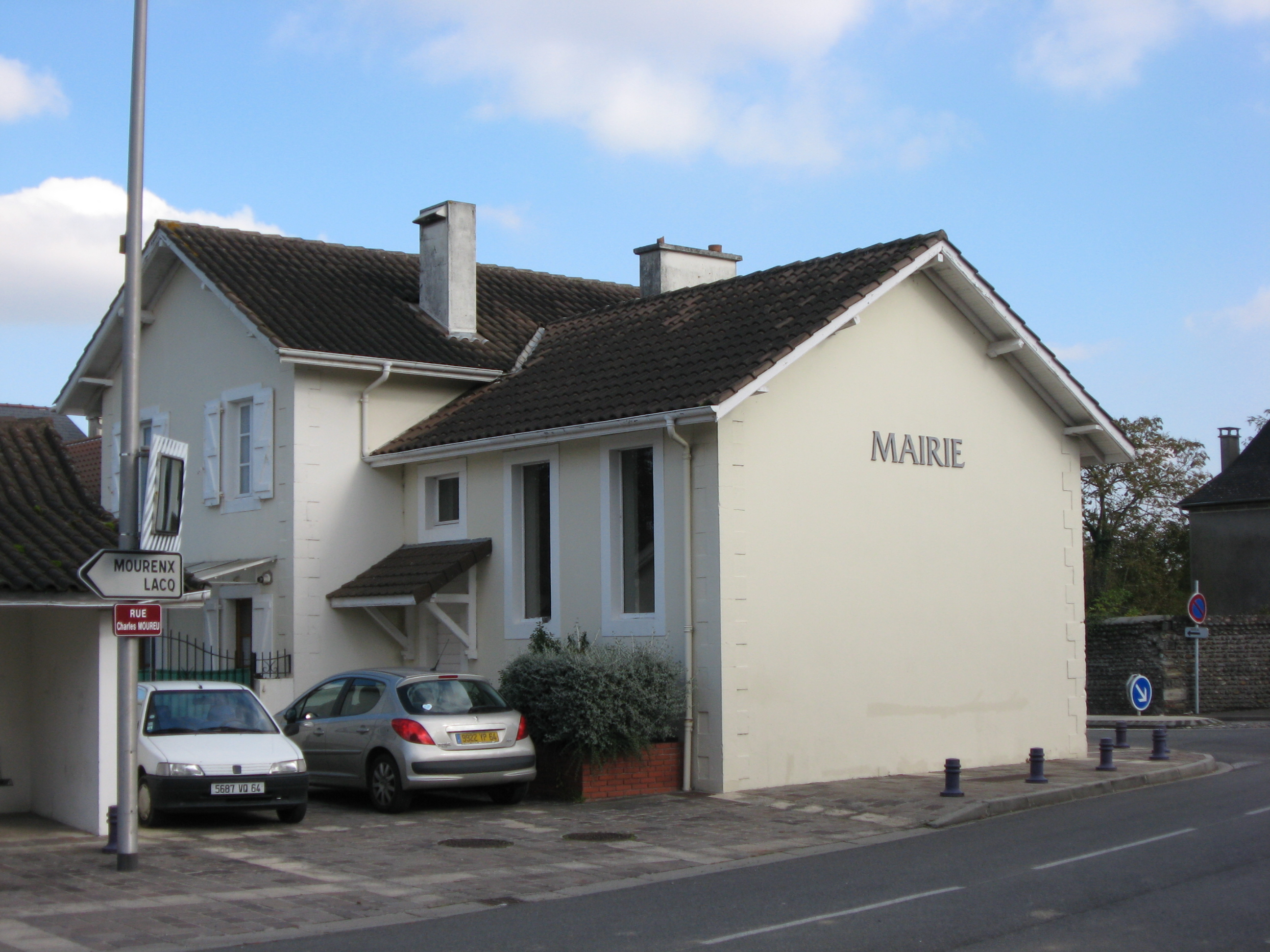 Vue de la mairie de Noguères (Pyrénées Atlantiques) Pyrénées).